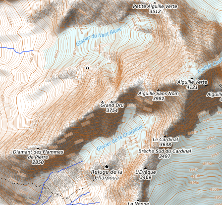 carte réalisée sur umap This map may be incomplete, and may contain errors. Don't rely solely on it for navigation.